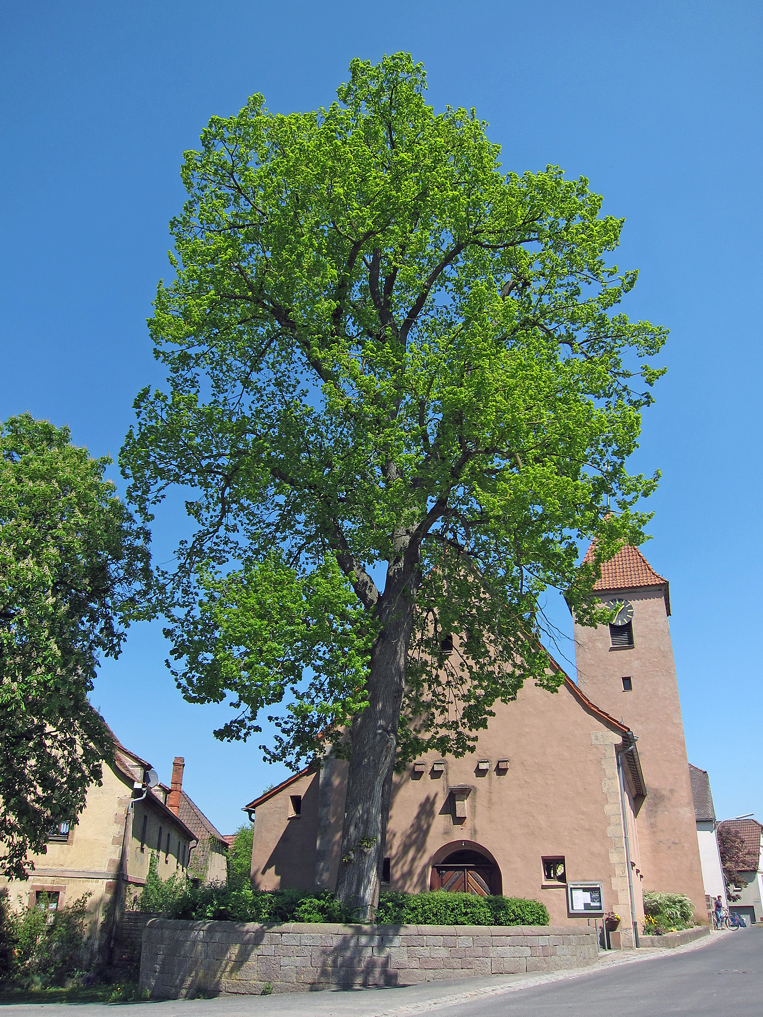 Dorflinde in Waizenbach